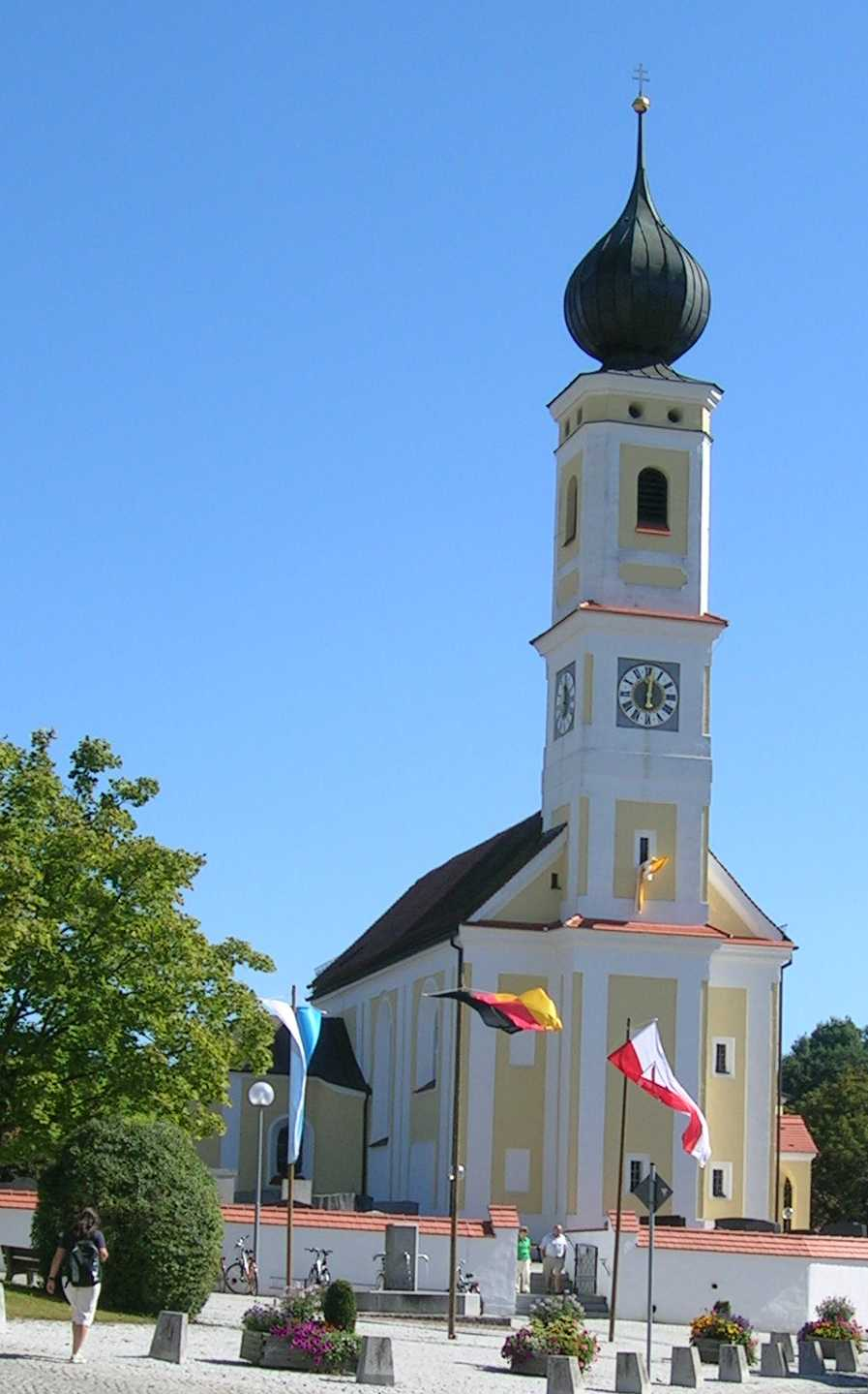 Pfarrkirche HörgertshausenThis is a photograph of an architectural monument.